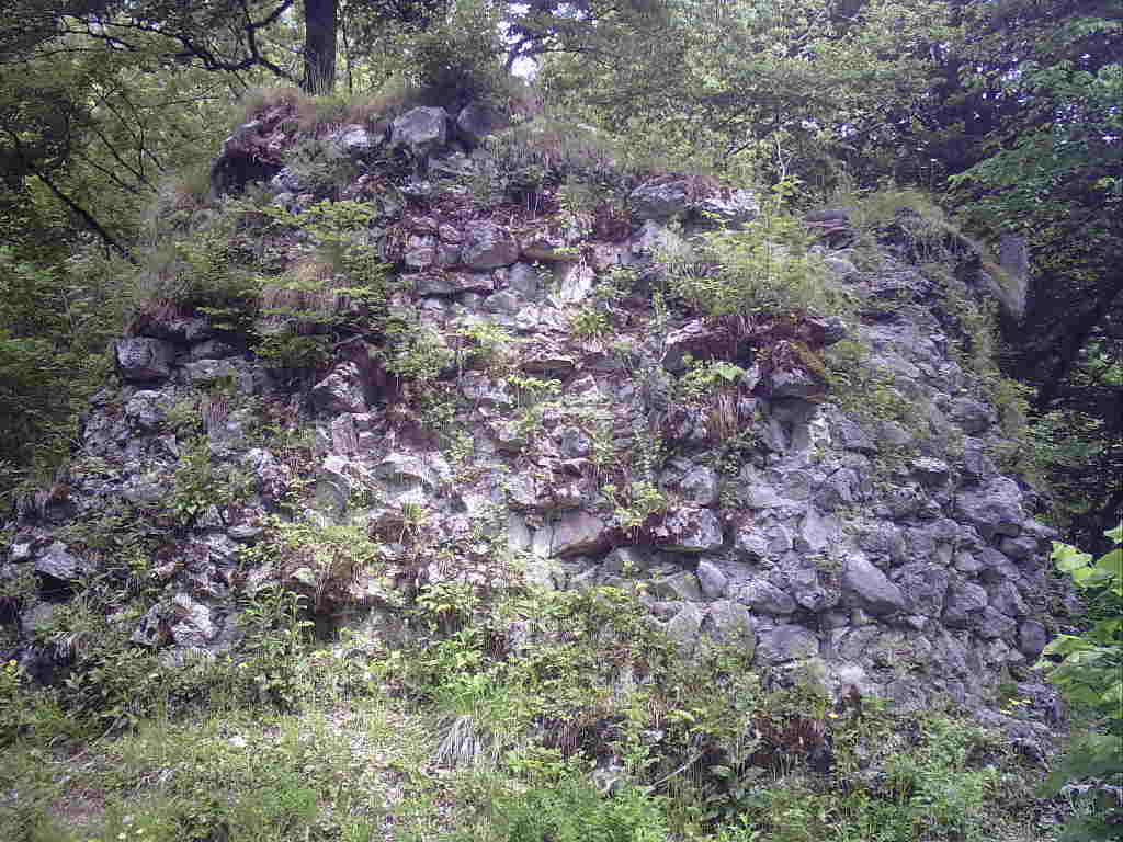 Ruine Hohenburg Lenggries